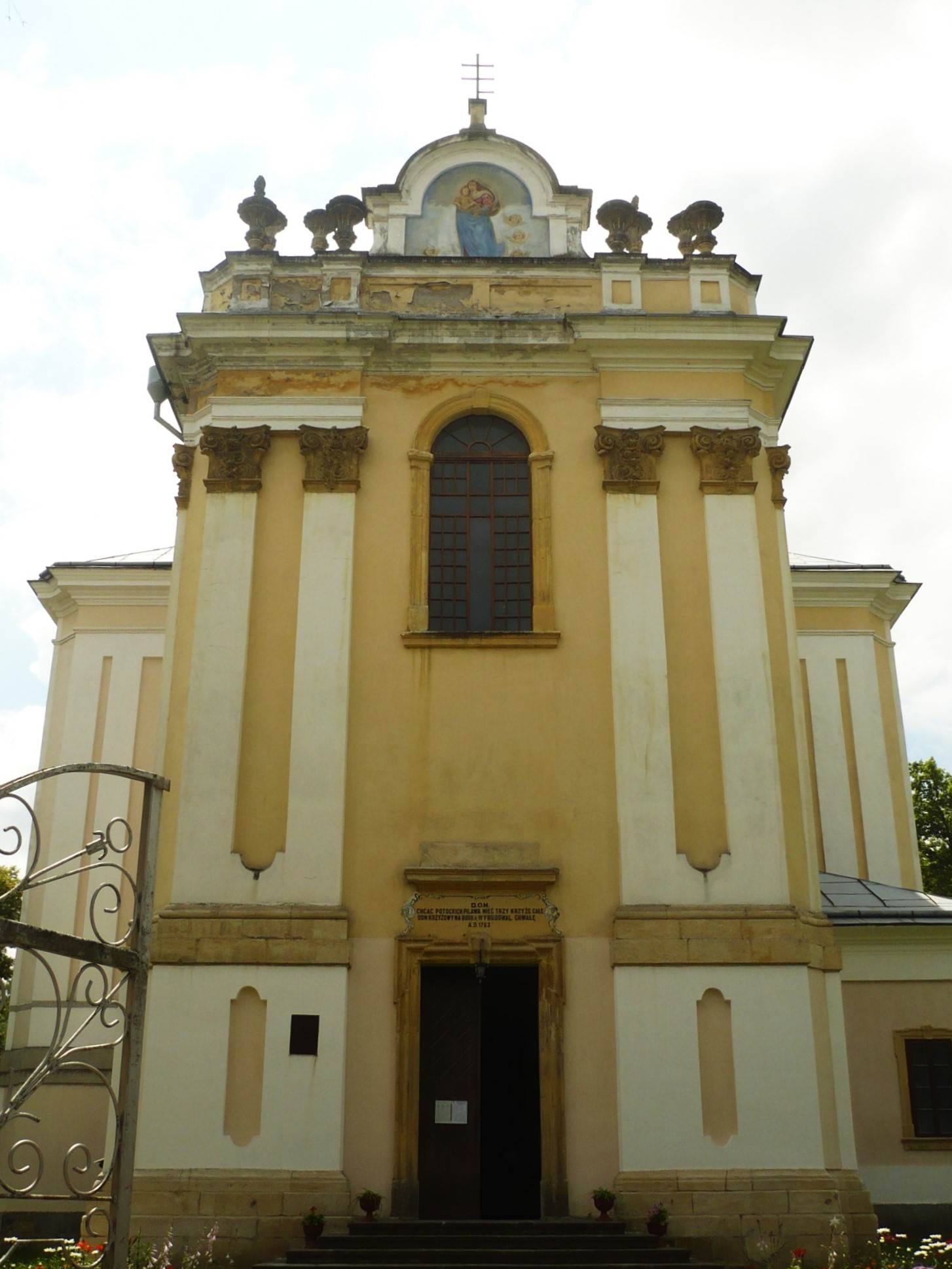 Buczacz. Kościół Wniebowzięcia NMP